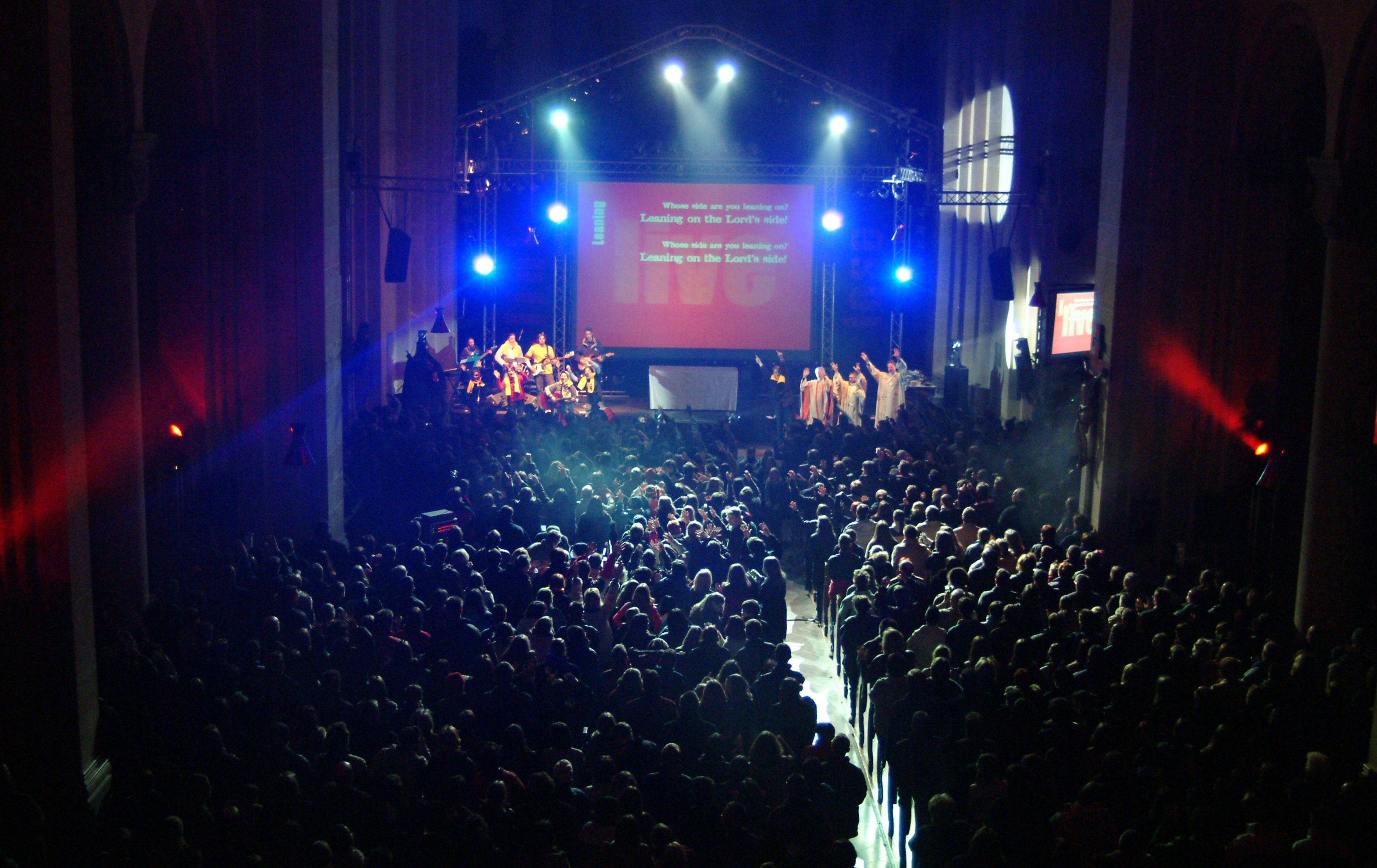 Riesige Bühnen, Licht- und Tontechnik wie bei einem Rockkonzert kennzeichnen die Jugendgottesdienste find•fight•follow.